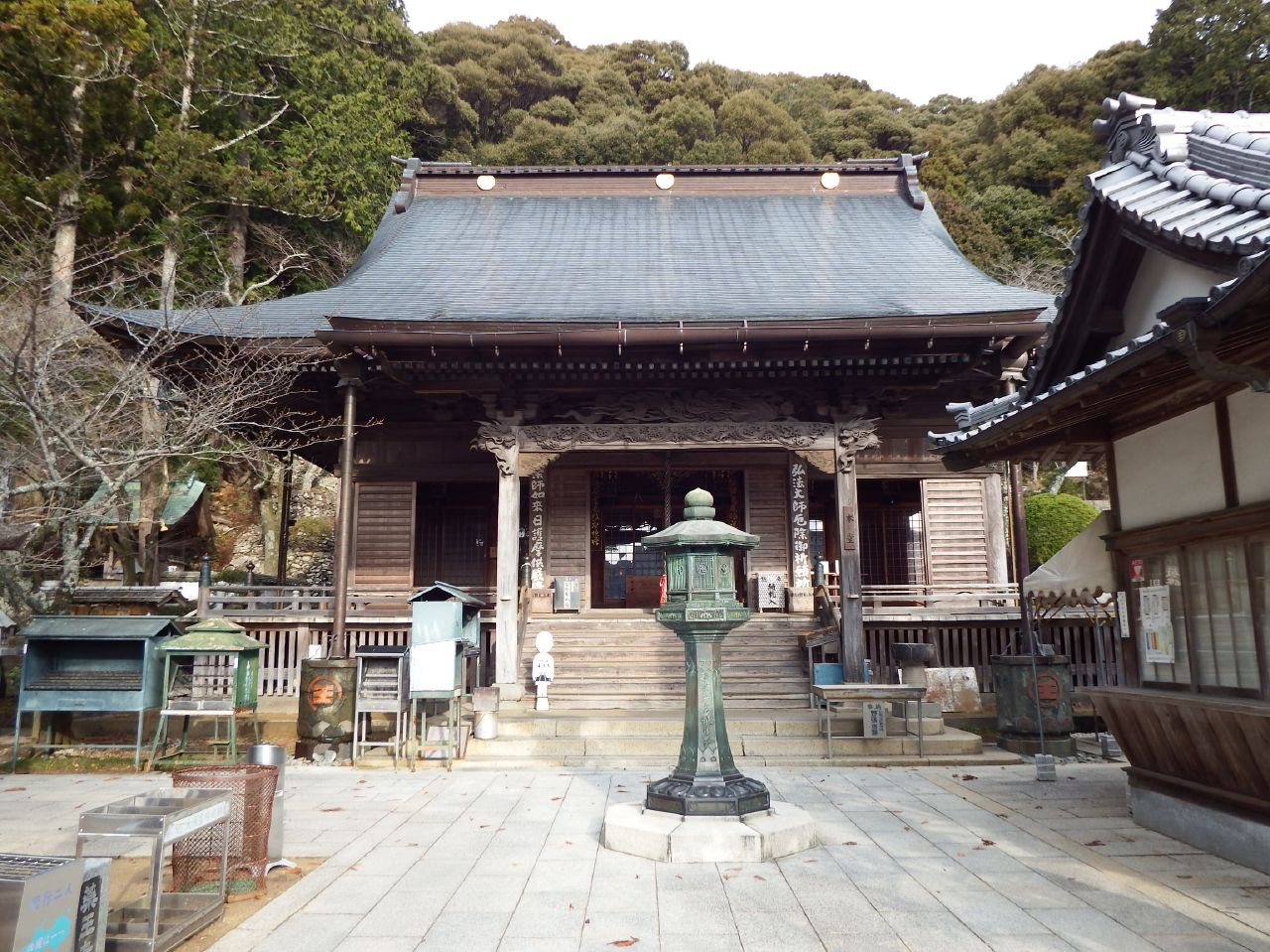 薬王寺の本堂